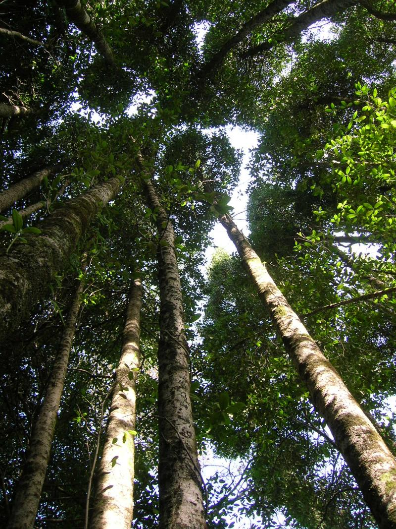 Arboles de Queule en Tomé, Región del Biobío, Chile